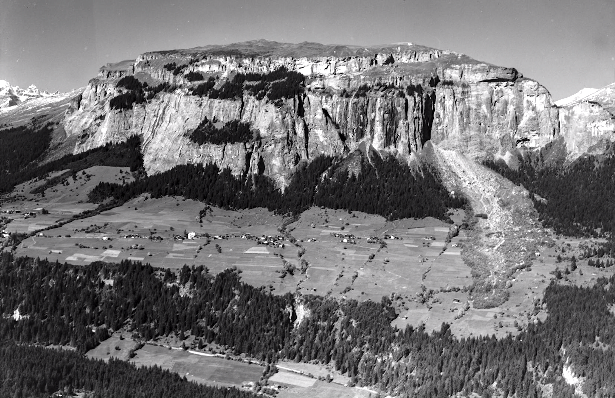 Tiefgeflogen